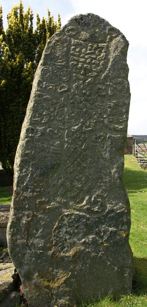 Migvie Stone (Migvie, Aberdeenshire, Scotland)